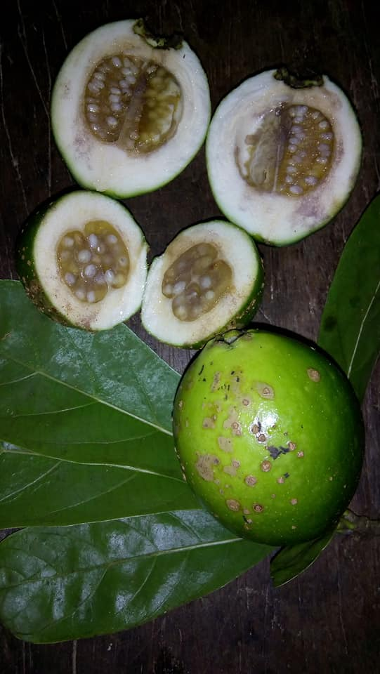 ತುಳು: ಅಡ್ಕಬಾರೆ